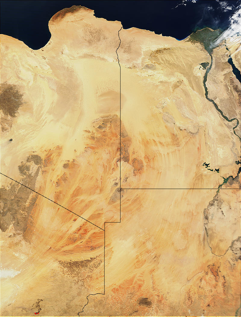 Satellitenfoto der nördlichen Sahara. Sichtbare Länder (von oben links im Uhrzeigersinn): Libyen, Ägypten, Sudan, Tschad